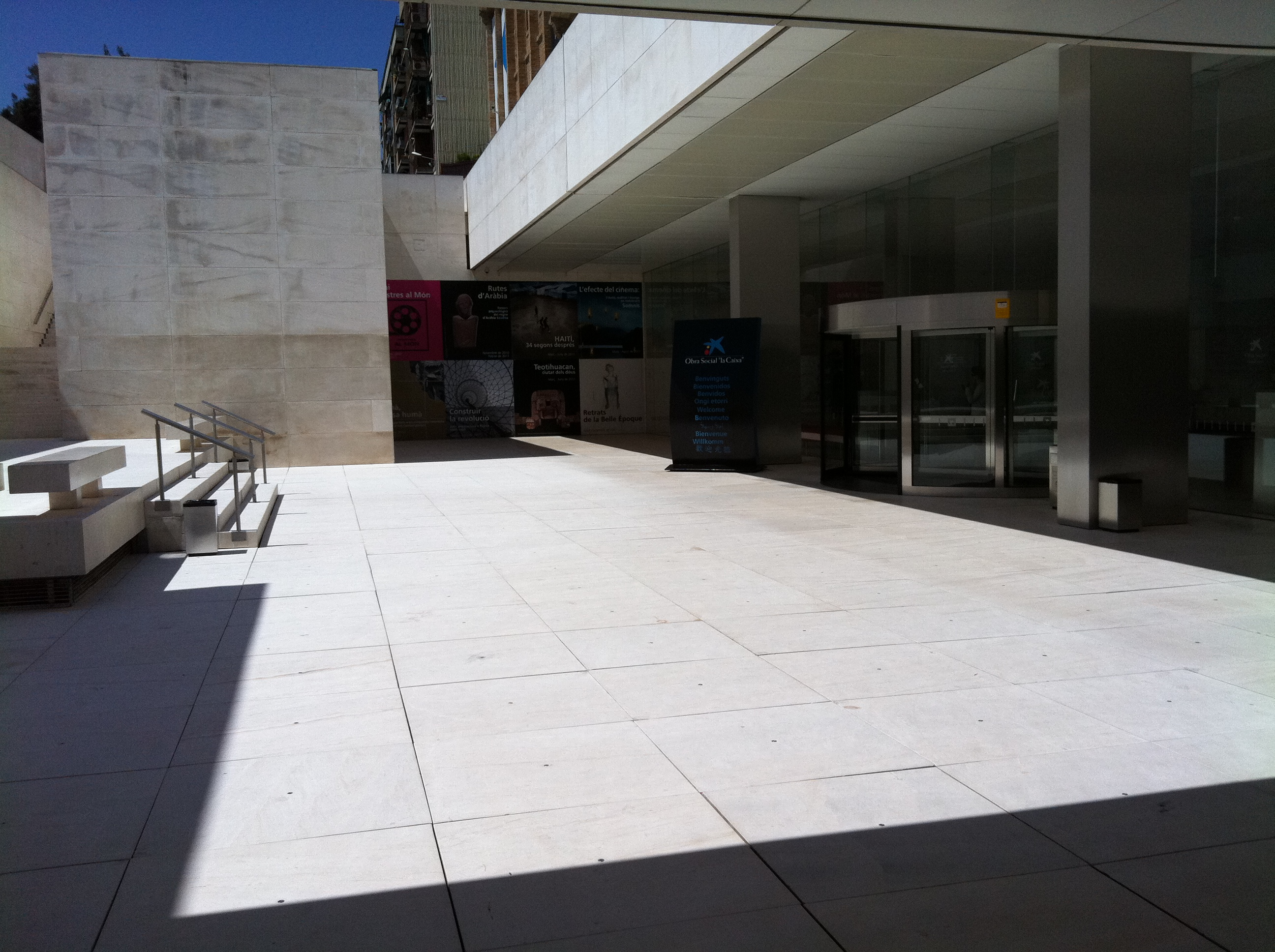 Entrance courtyard — at CaixaForum Barcelona.